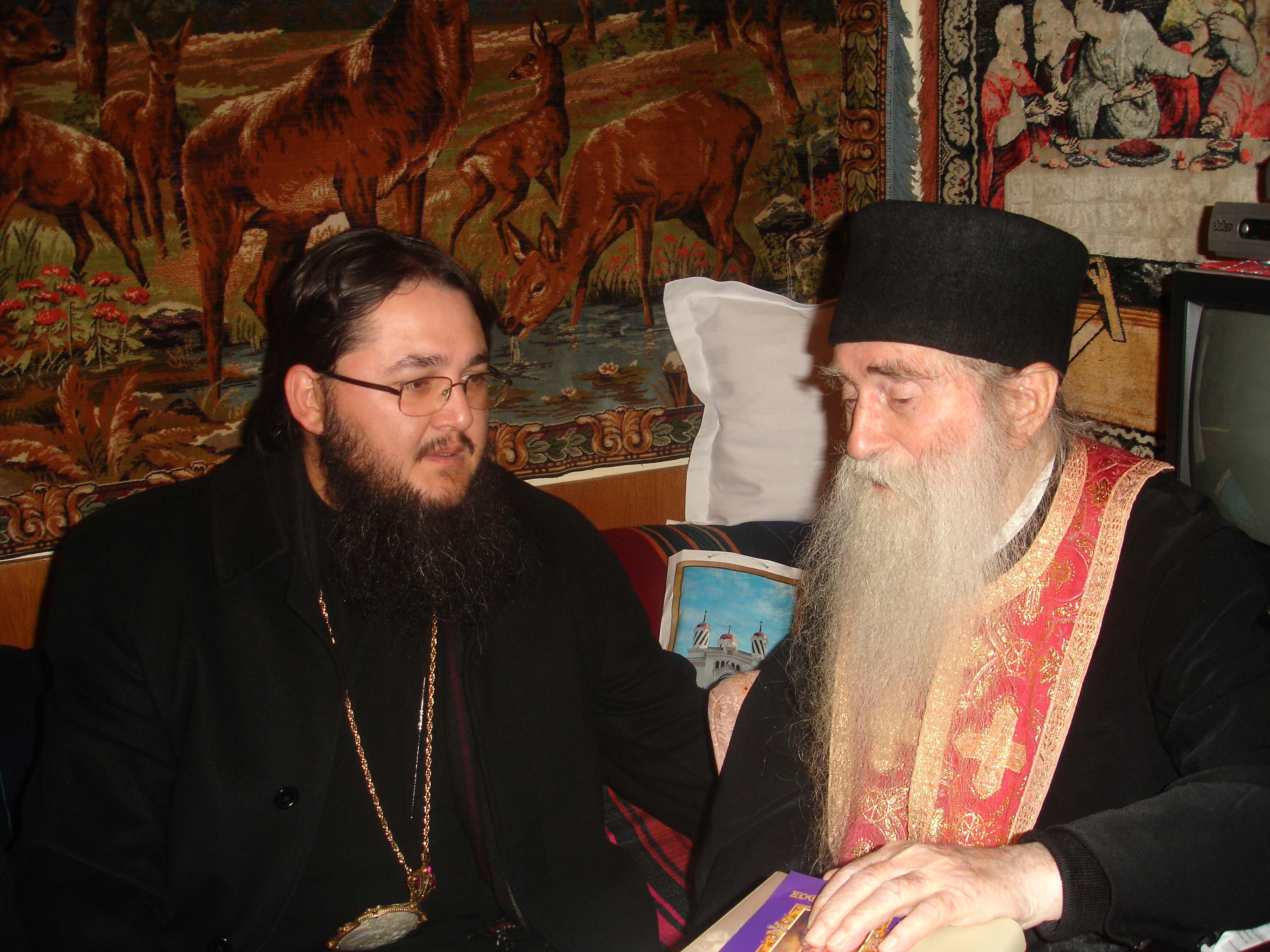 PS Ambrozie alături de Arhim. Arsenie Papacioc, la Mănăstirea Techirgiol